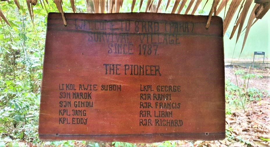 Plag nama